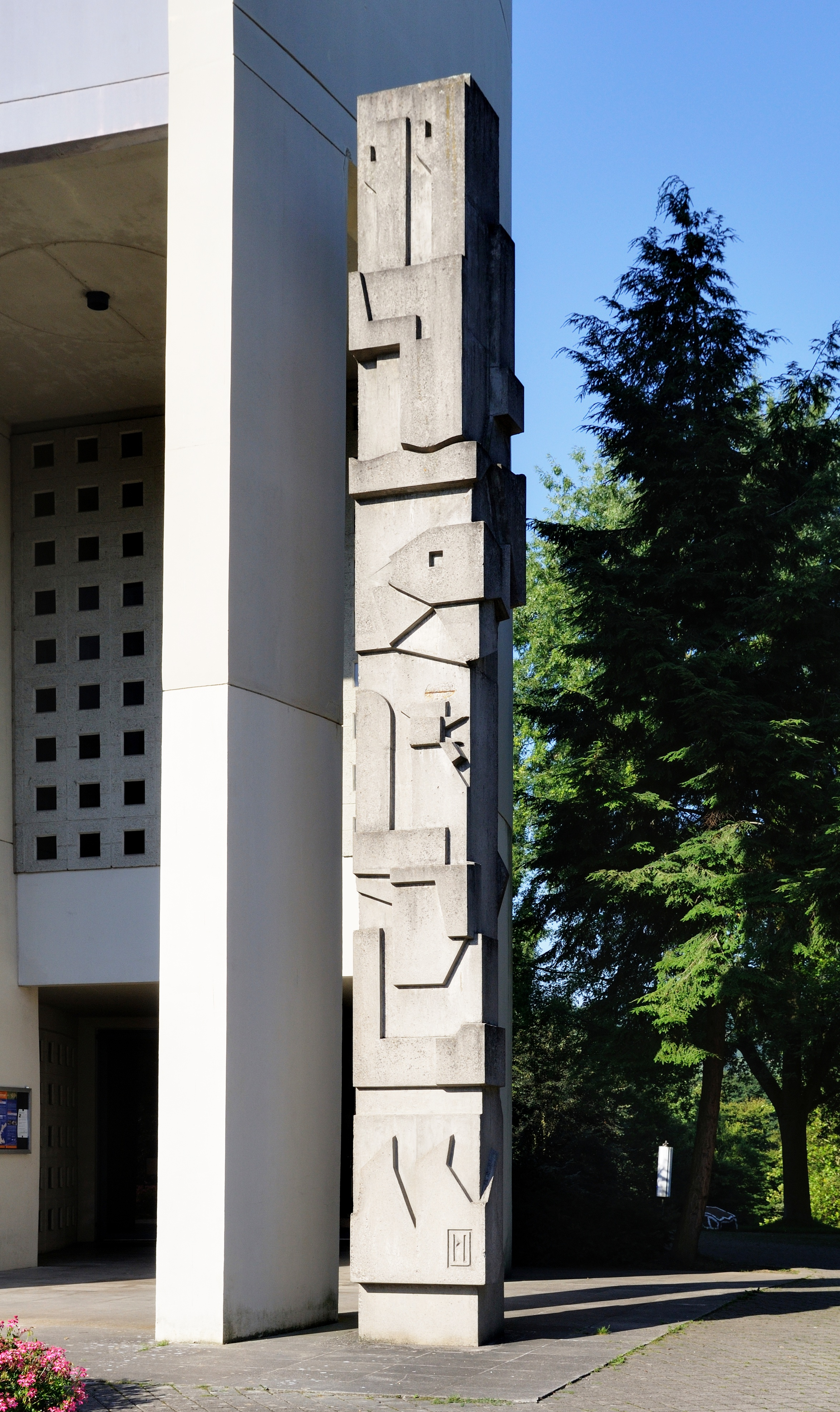 Lörrach: St. Peter (Betonsäule)